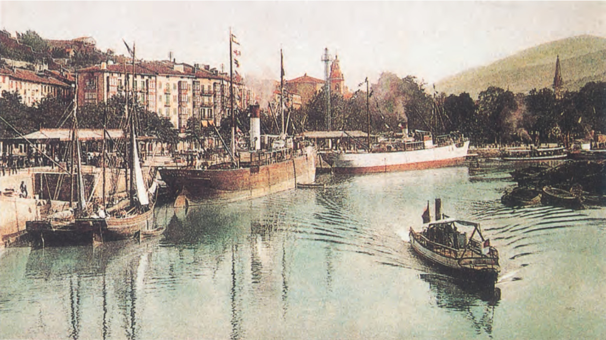 Bilboko Areatza 1880 inguruan